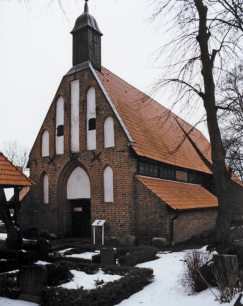 Dorfkirche in Waase (Mecklenburg-Vorpommern)